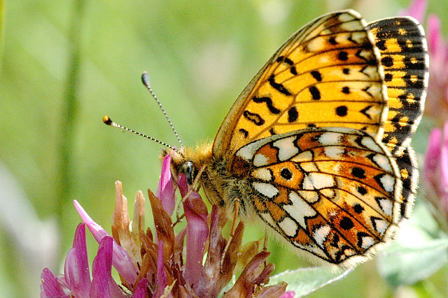 Picture taken in Commanster, Belgian High Ardennes . Species: Boloria selene